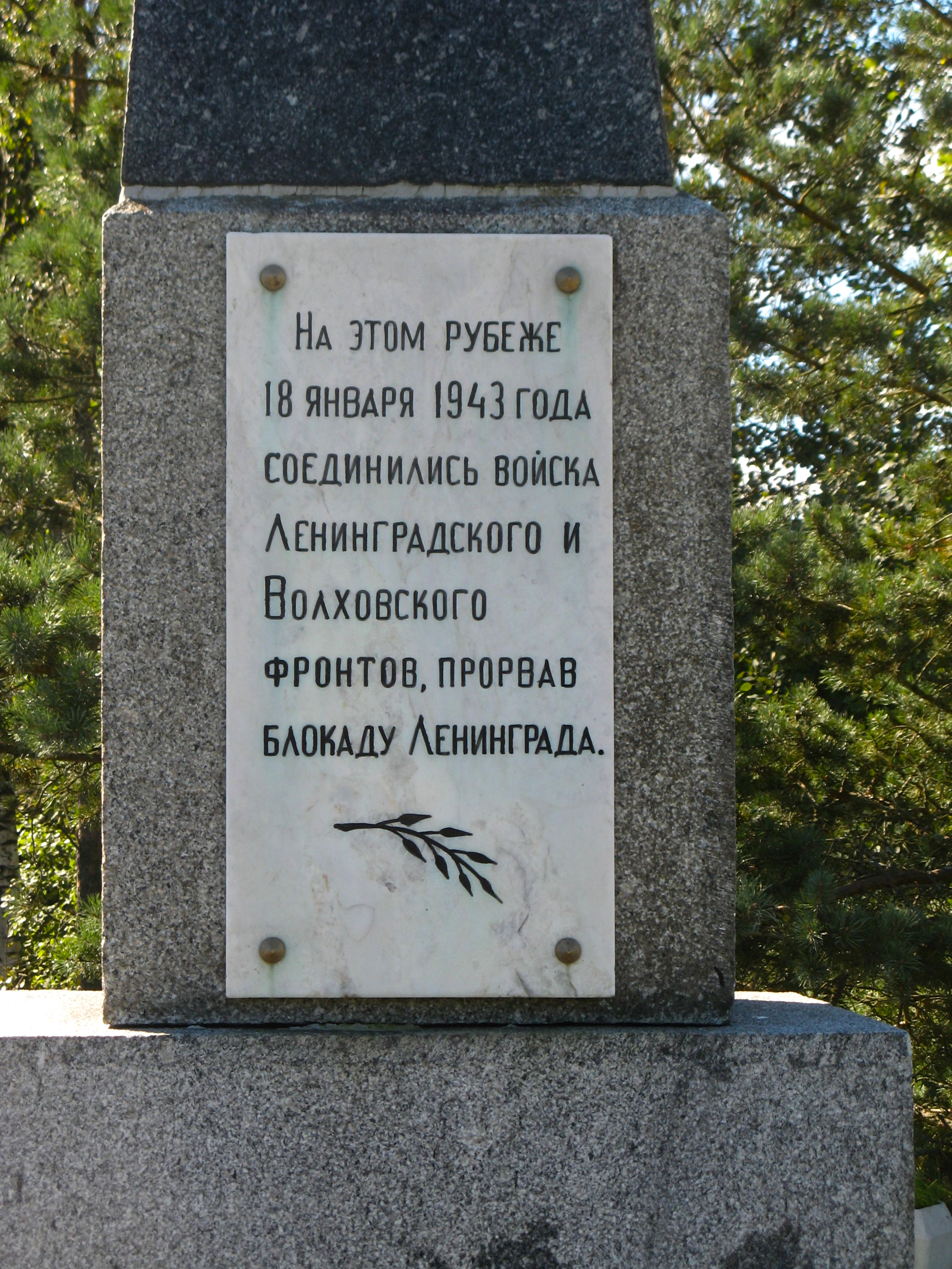 Место соединения войск Ленинградского и Волховского фронтов, осуществивших прорыв блокады города Ленинграда 18 января 1943 г. 'Зеленый пояс Славы Ленинграда': 2,5 км юго-восточнее посёлка, у Мурманского шоссе, Синявино, Кировский район, Ленинградская область